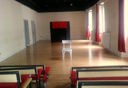 Davide Abbatescianni, fotocamera digitale telefono mobile, aula di posa Accademia Teatrale ITACA. Autorizzo personalemente in quanto autore dello scatto l'utilizzo dell'immagine.